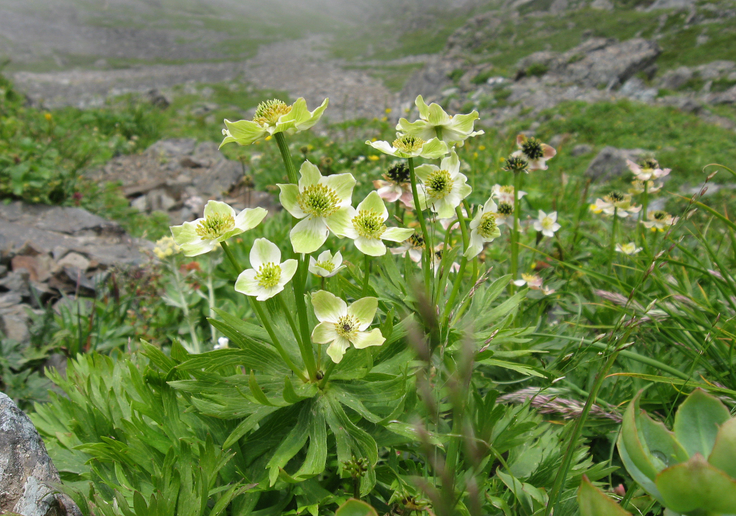 ミドリハクサンイチゲ (学名:Anemone narcissiflora f. viridis)